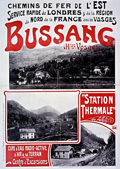 Chemins de fer de l'Est. Service rapide de Londres & de la région du Nord de la France avec les Vosges. Bussang (Htes Vosges) "Station thermale" à 8h. de Paris... Centre d'excursions. Affiche de Louis Geisler sc.